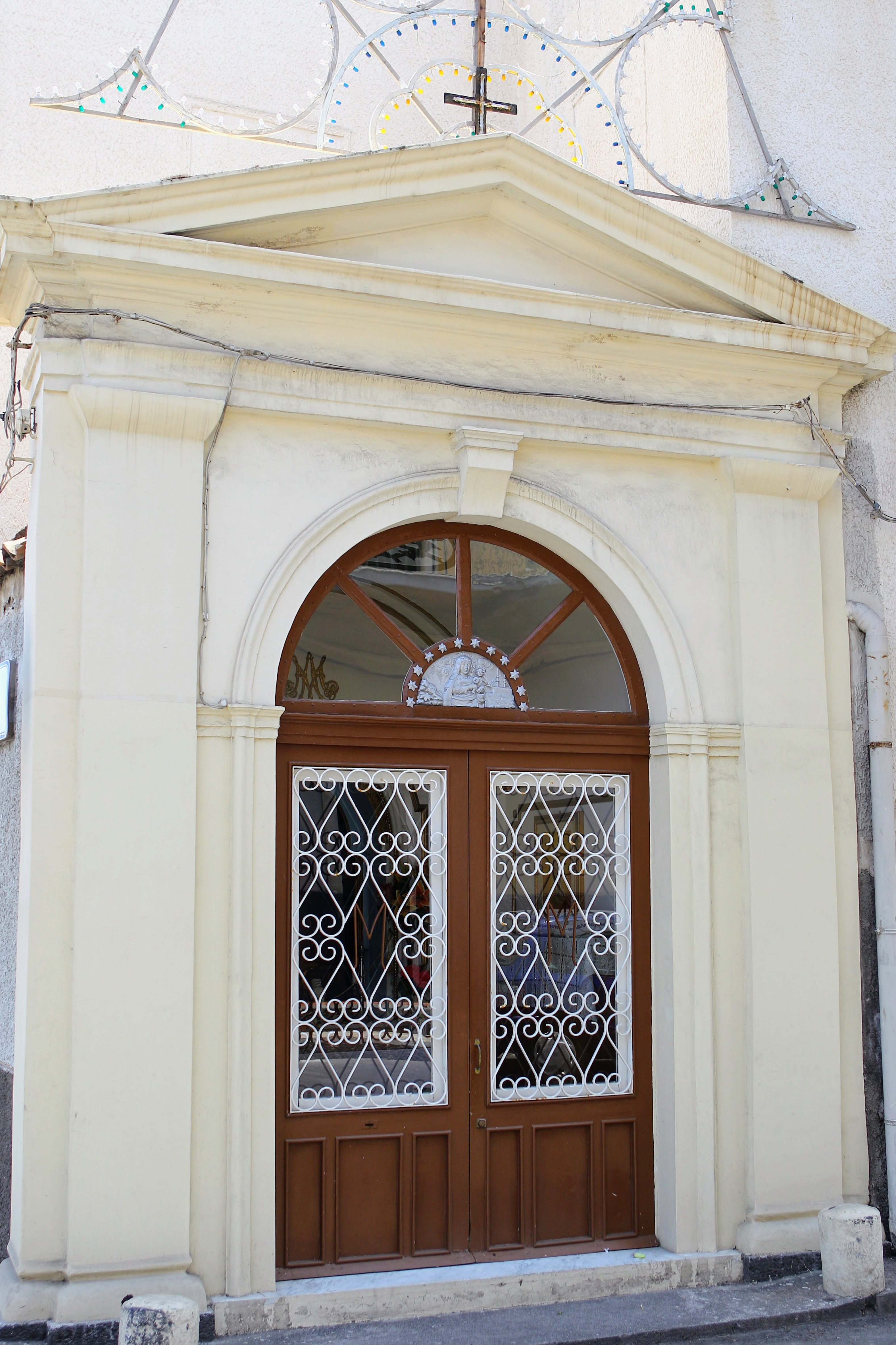 Edicola votiva dedicata alla Madonna della Buona Nuova in Aci Trezza